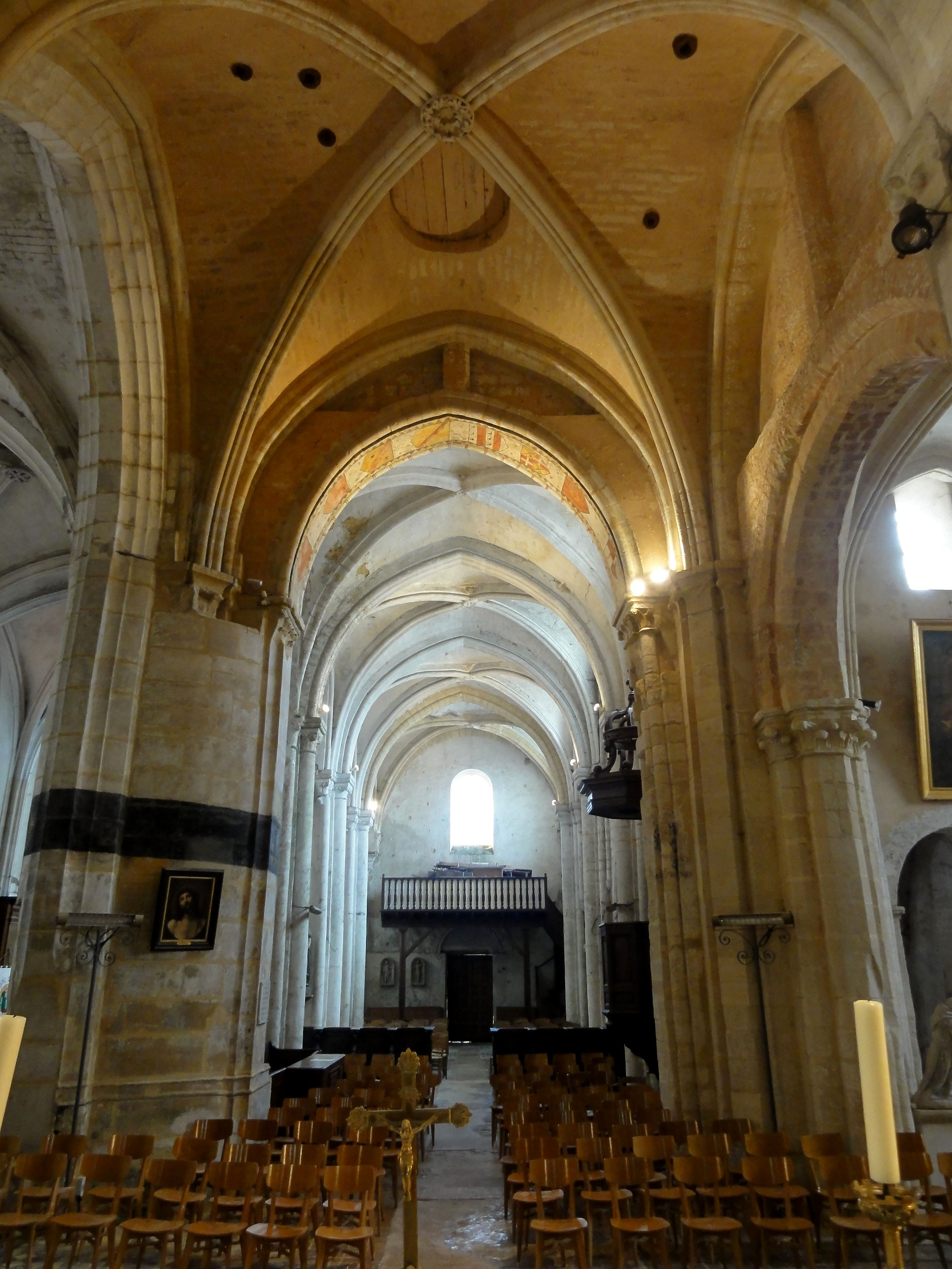 Croisée du transept, vue vers l'ouest.